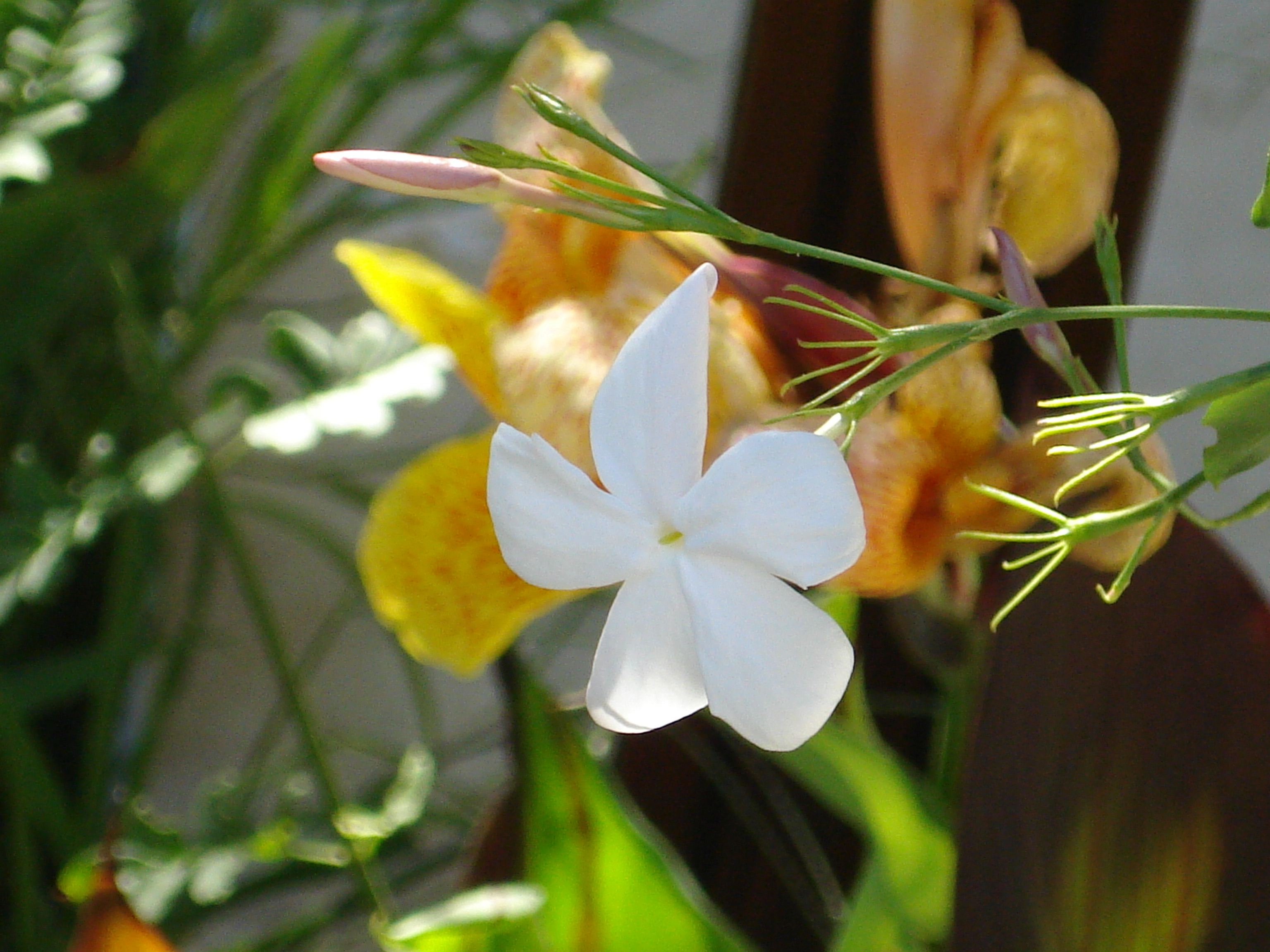 Yasemin (Jasminum)